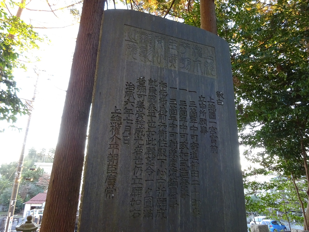 上総広常願文